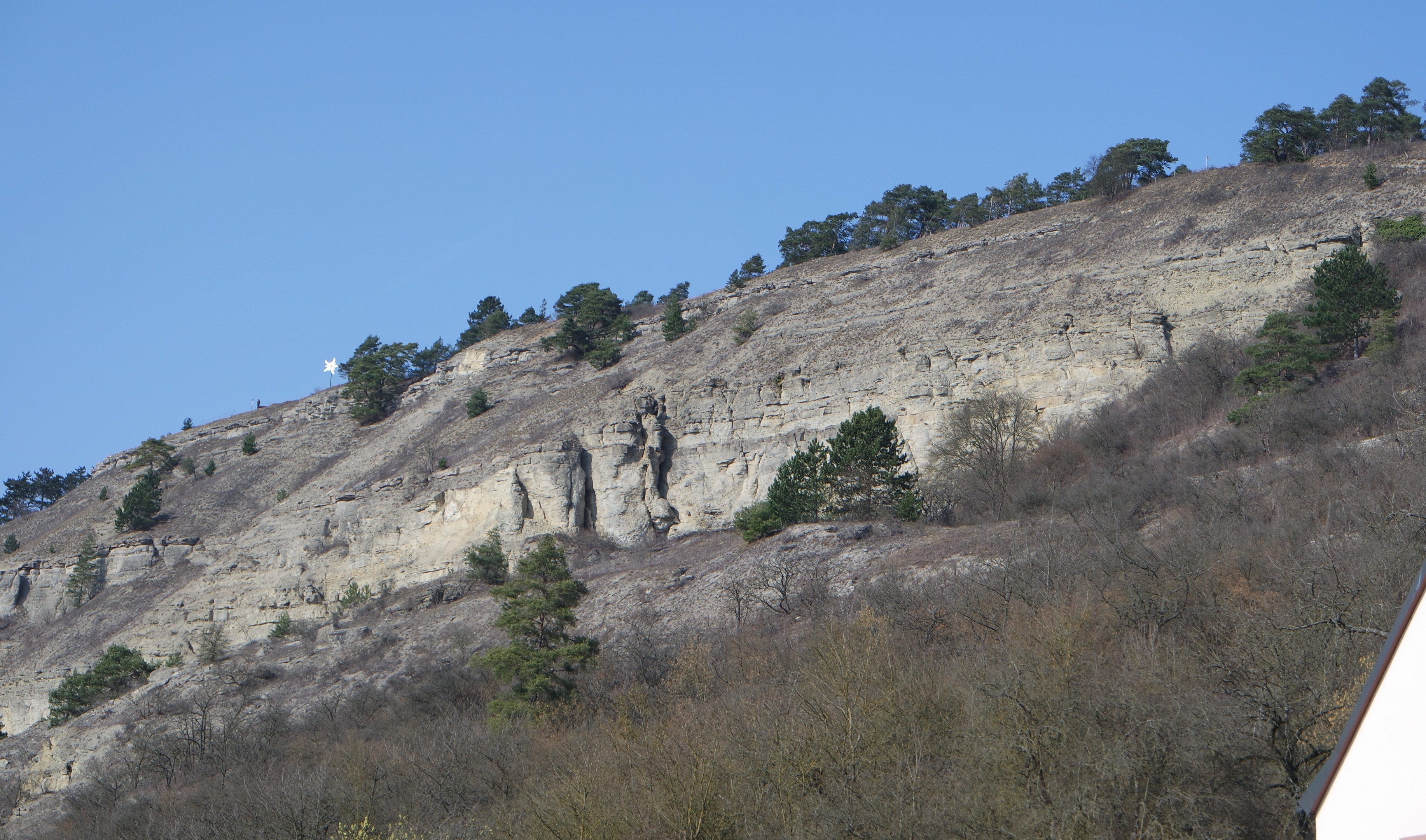 Kalbenstein nördl. Karlstadt - Bild vom Aufstieg durch das Bergsturzgelände - Blick von unten